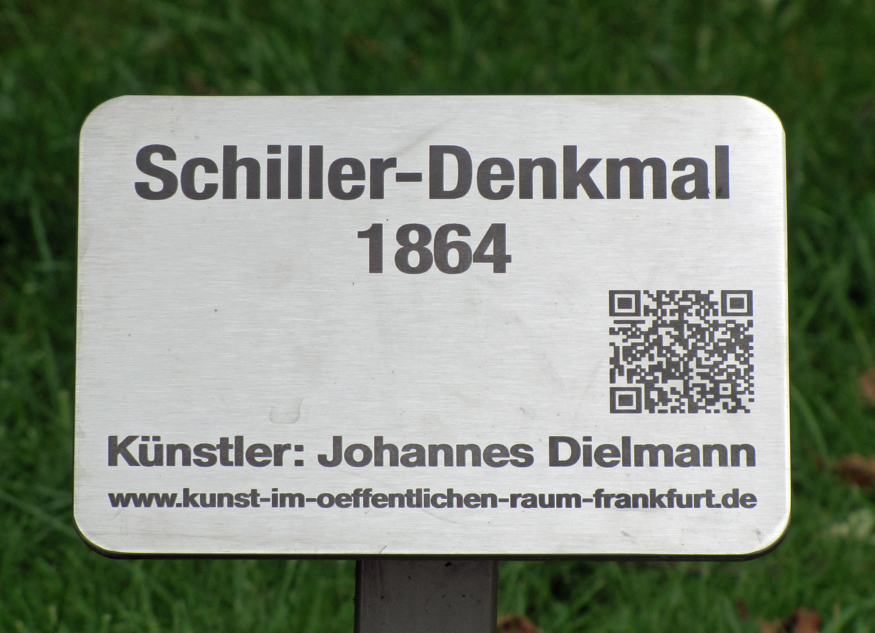 QR-Code auf Denkmal-Infoschild (hier: Schiller-Denkmal). Ein Pilotprojekt des Kulturamtes Ffm für das Internetportal Der QR-Code entspricht dem Text " Da der Text weder mit "URLTO:" noch mit "http" beginnt haben einige Anwendungen Probleme damit ihn als URL zu interpretieren.